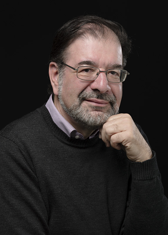 Gilbert Kaenel, directeur du Musée cantonal d'archéologie et d'histoire du canton de Vaud, né en 1949 à Payerne. Portrait réalisé à la BCU Lausanne, le 27 avril 2015.